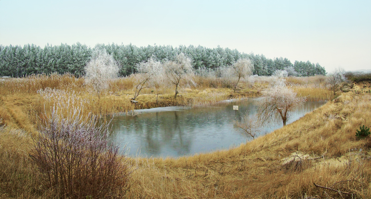 A pond in Swarzynice, Poland